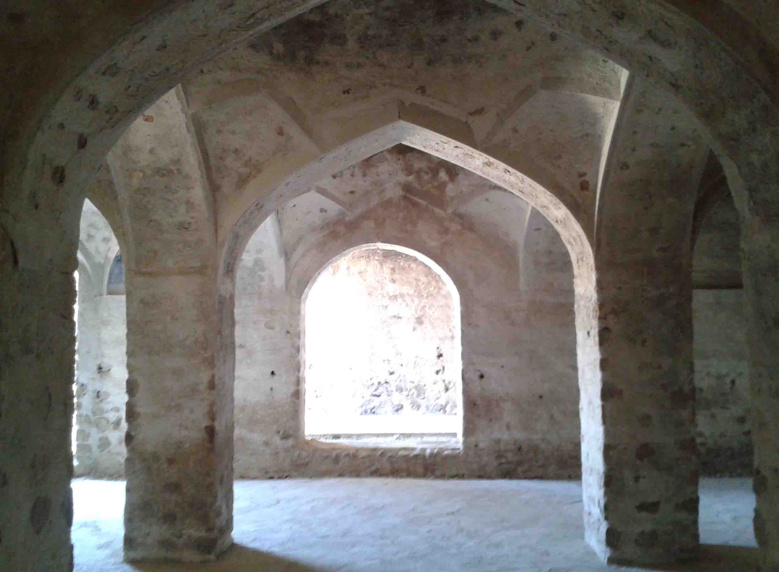 نمای درونی کاروانسرای خواجه ابوالحسن جویم